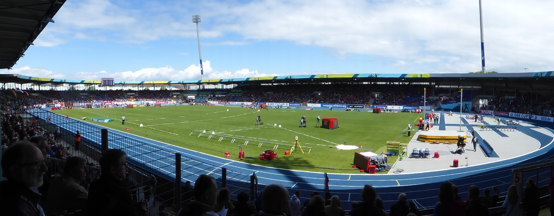 Panorama des Eintracht-Stadions mit der neuen blauen Tartan-Bahn, aufgenommen während der Leichtathletik-Team-EM 2014